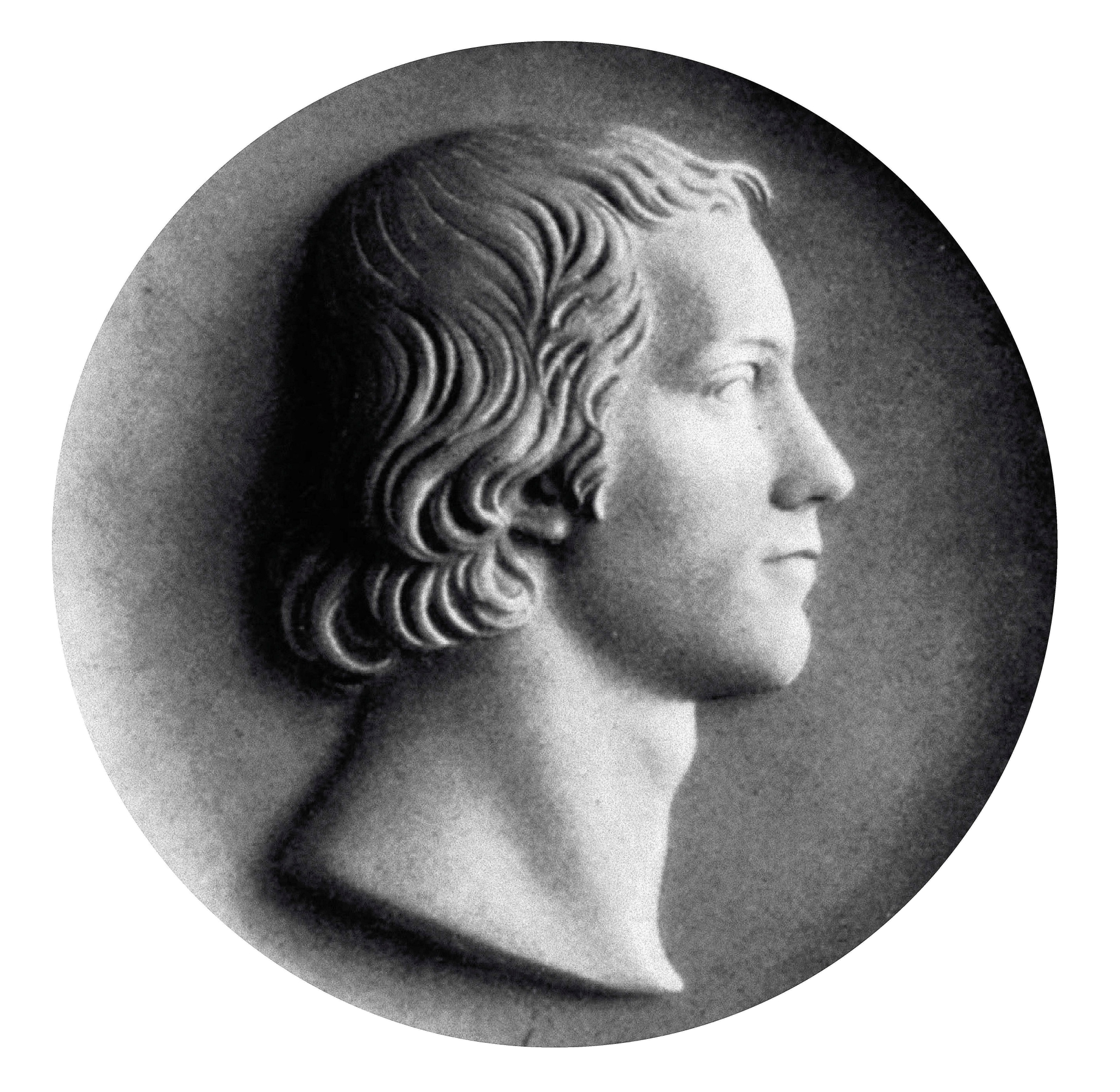 W.H. Wackenroder